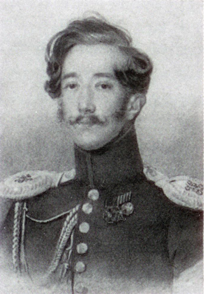 Пётр Григорьевич Демидов (1808-1862), генерал-лейтенант, сын Г.А.Демидова.